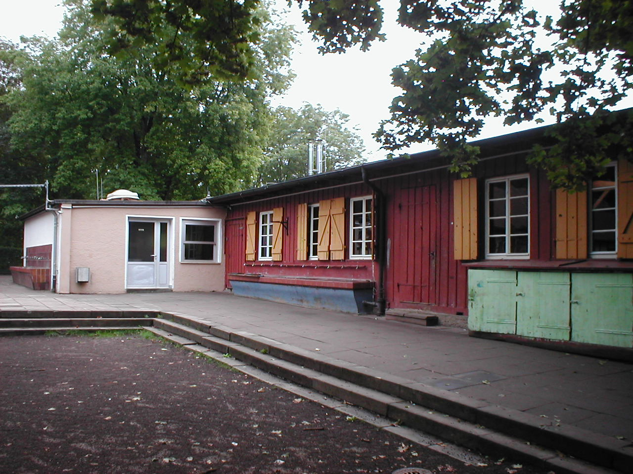 Wirtschaftsgebäude (links) und Rote Halle im Walderholungsheim Gaffenberg bei Heilbronn